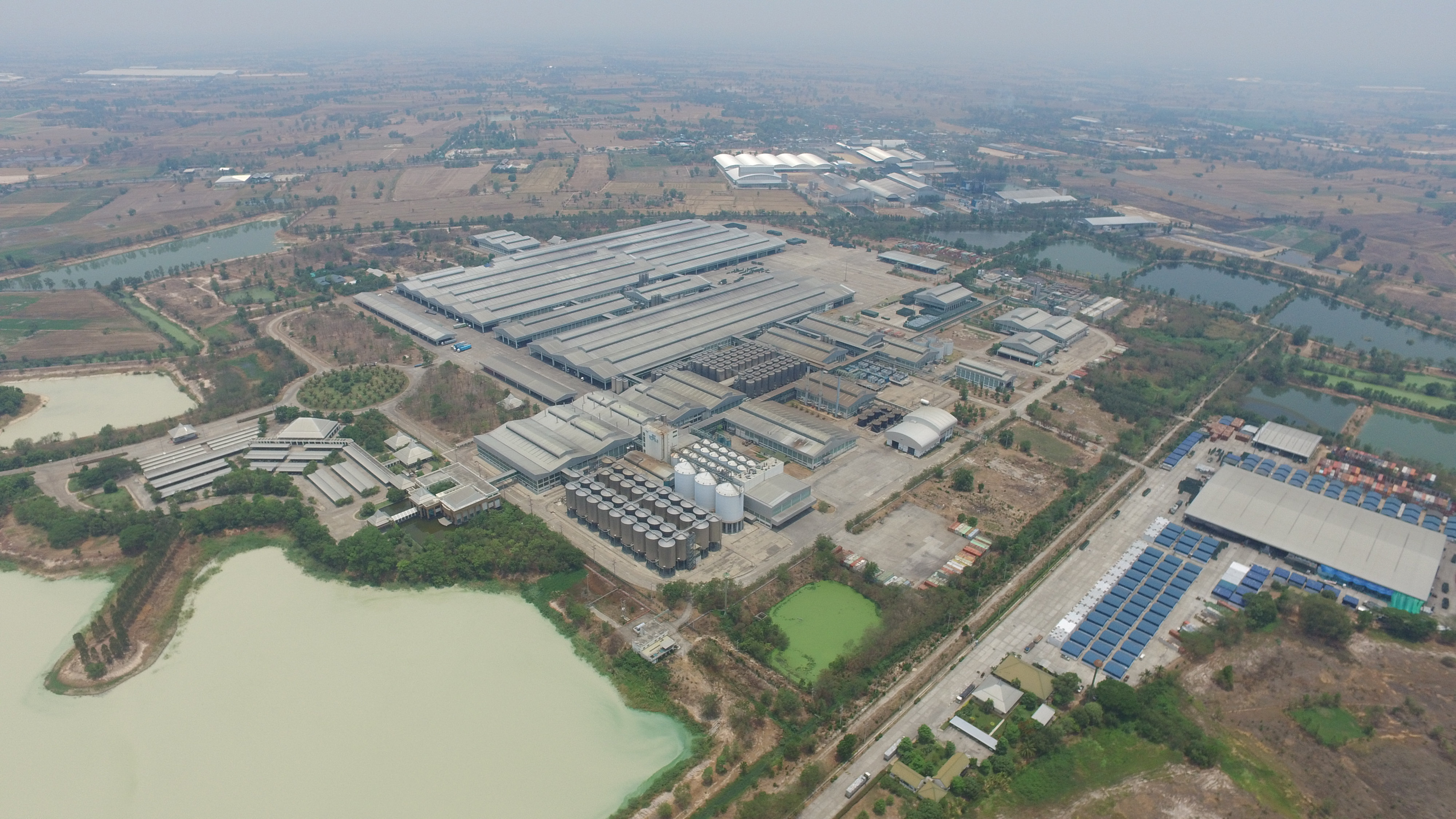 โรงเบียร์กำแพงเพชร